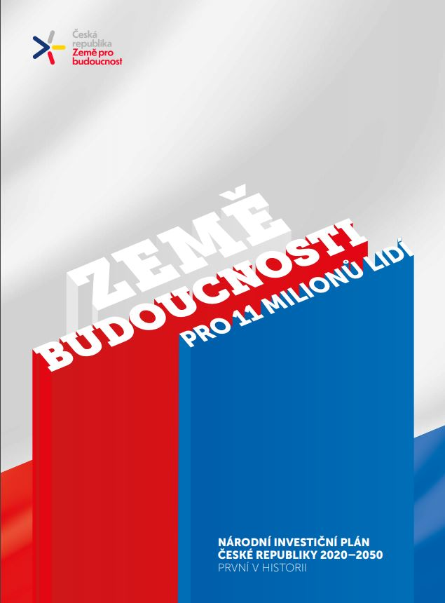 Jedná se o titulní stránku písemného vládního materiálu České republiky veřejně dostupného. Je to skoro obdoba vlajky evropské unie. Je nedůstojné žádat vládu ČR, aby ještě navíc dávala souhlas zveřejnit titulní stránku tohoto historického veřejného materiálu. Vláda oslovuje všechny občany, aby se zapojili do připomínek. Nevidím jeden jediný rozumný důvod, proč by měla být tato zkopírovaná titulní stránka smazána. Žádat o souhlas vládu mi připadá totálně trapné, když to každý může vidět. Nejedná se o žádné dílo nějakého jednotlivce, tam bych to pochopil. Je to vládní materiál pro všechny lidi Česka i světa. Tak vás prosím zvažte to a tento obrázek nemažte. Na stránce ve wikipedii je skutečně krásný a věrohodný. Zde ten vládní materiál každý vidí: Děkuji.